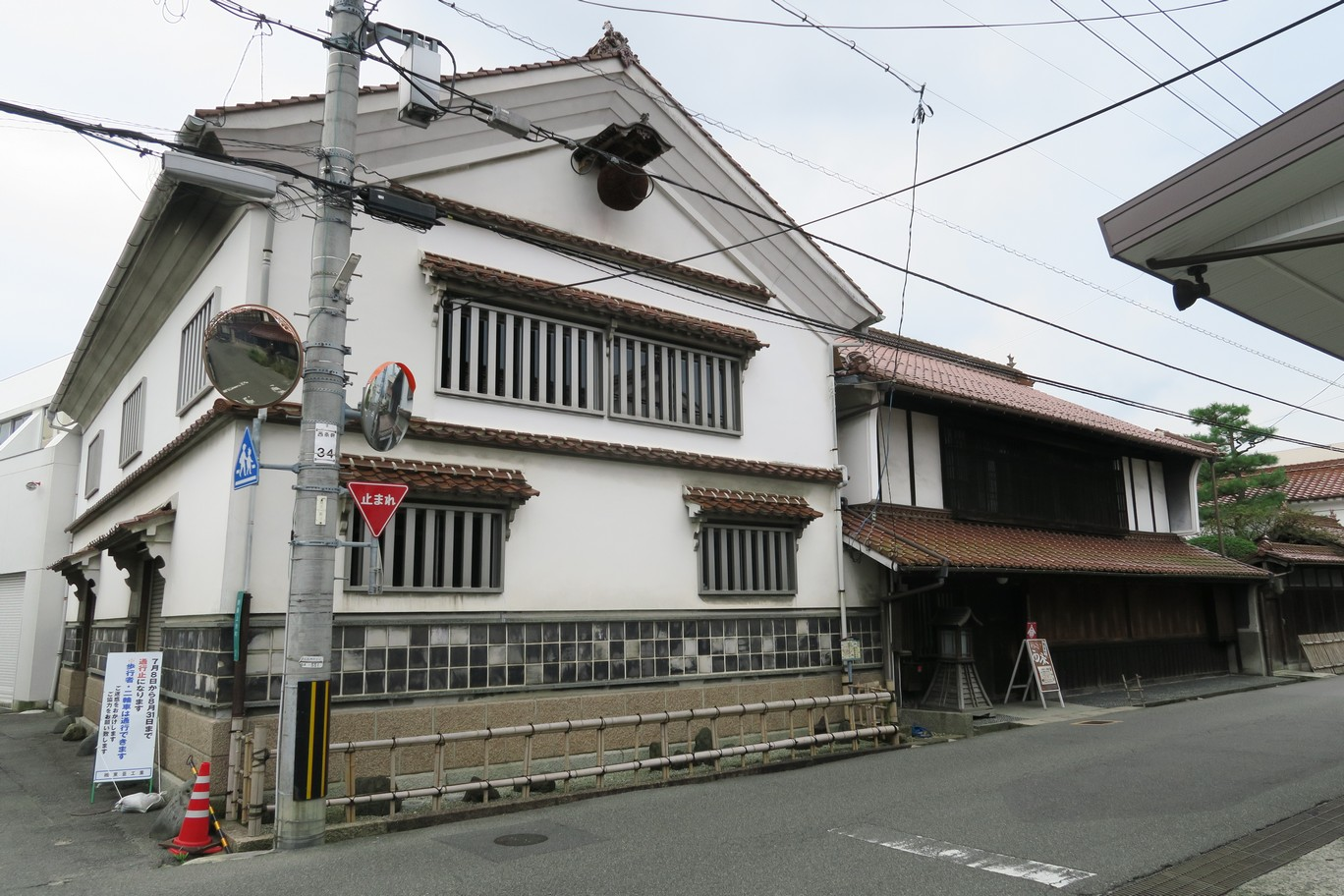 賀茂泉酒造